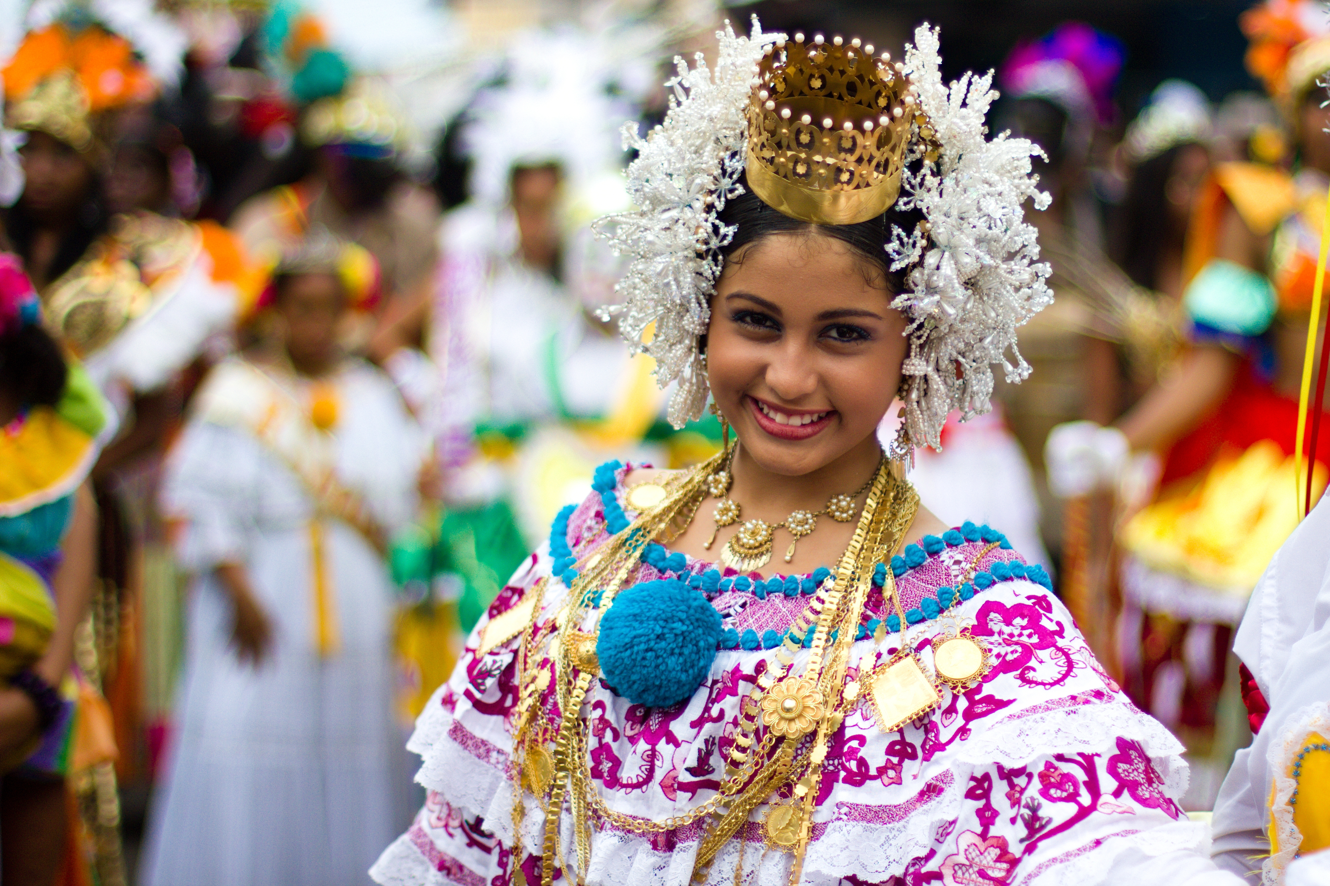 Empollerada en desfile "Fiesta de Fiestas", Chitré, provincia de Herrera, septiembre de 2012. Los tembleques son las perlas decorativas del pelo.